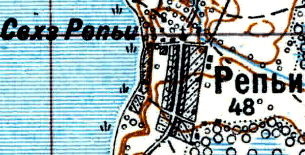 Топографическая карта Ленинградской области, квадрат Vc-29 (Батецкая), деревня Репьи